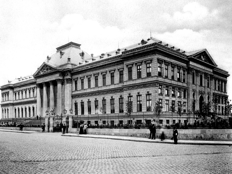 Palatul de justitie (astazi Universitatea din Craiova) a fost construit la 1890, in stil neo-clasic, dupa planurile arhitectului Ion Sololescu.